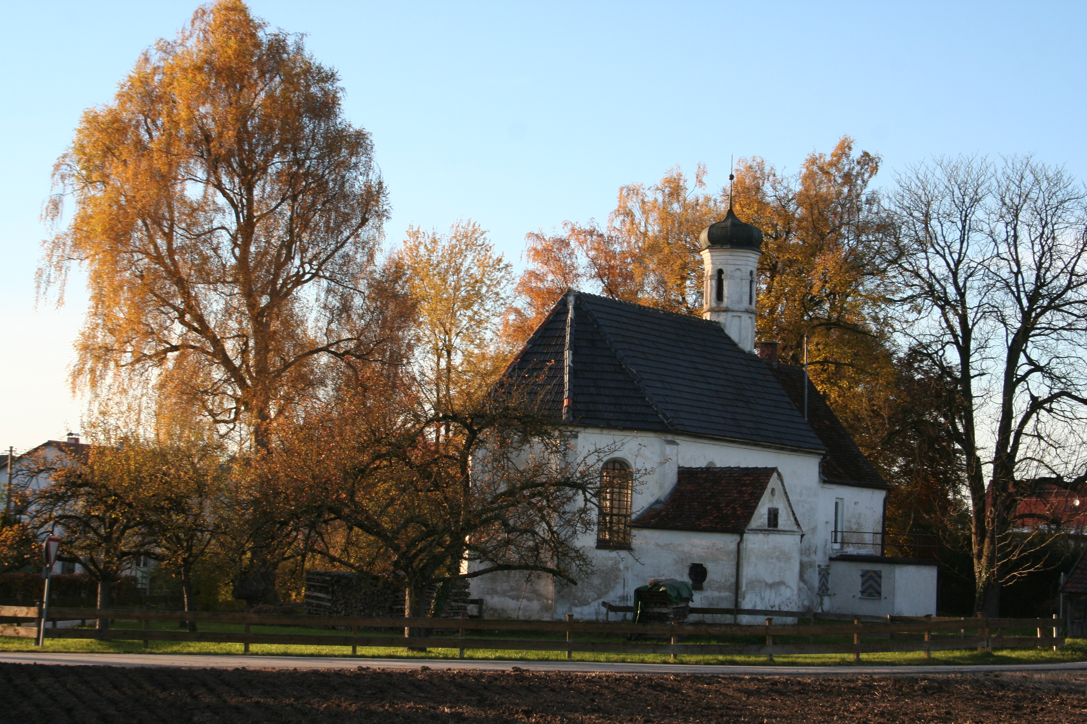 Englisch-Gruß-Kapelle am südöstlichen Ortsrand von Kirchheim i.Schw.